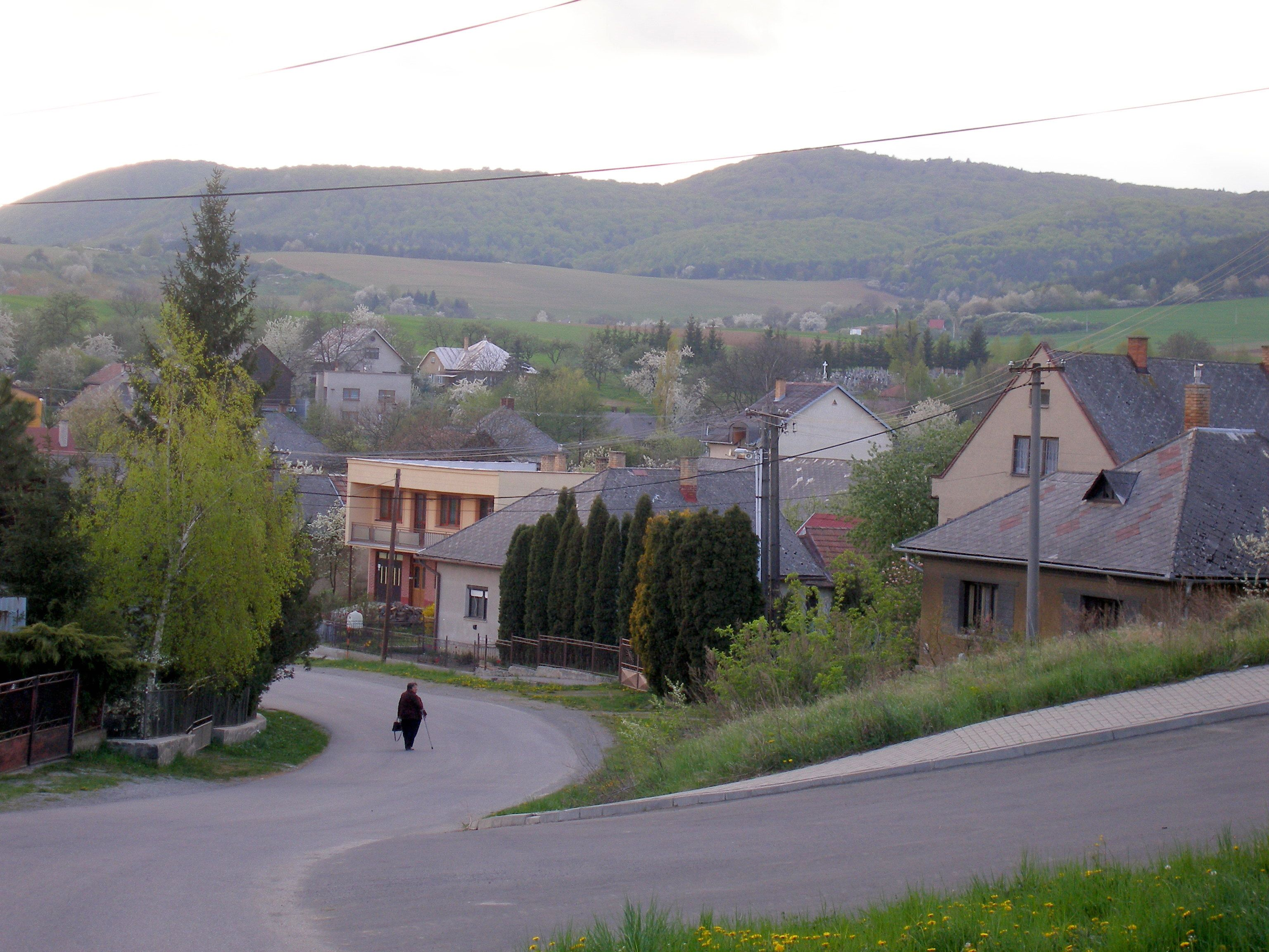 Obec Terňa okres Prešov región Šariš